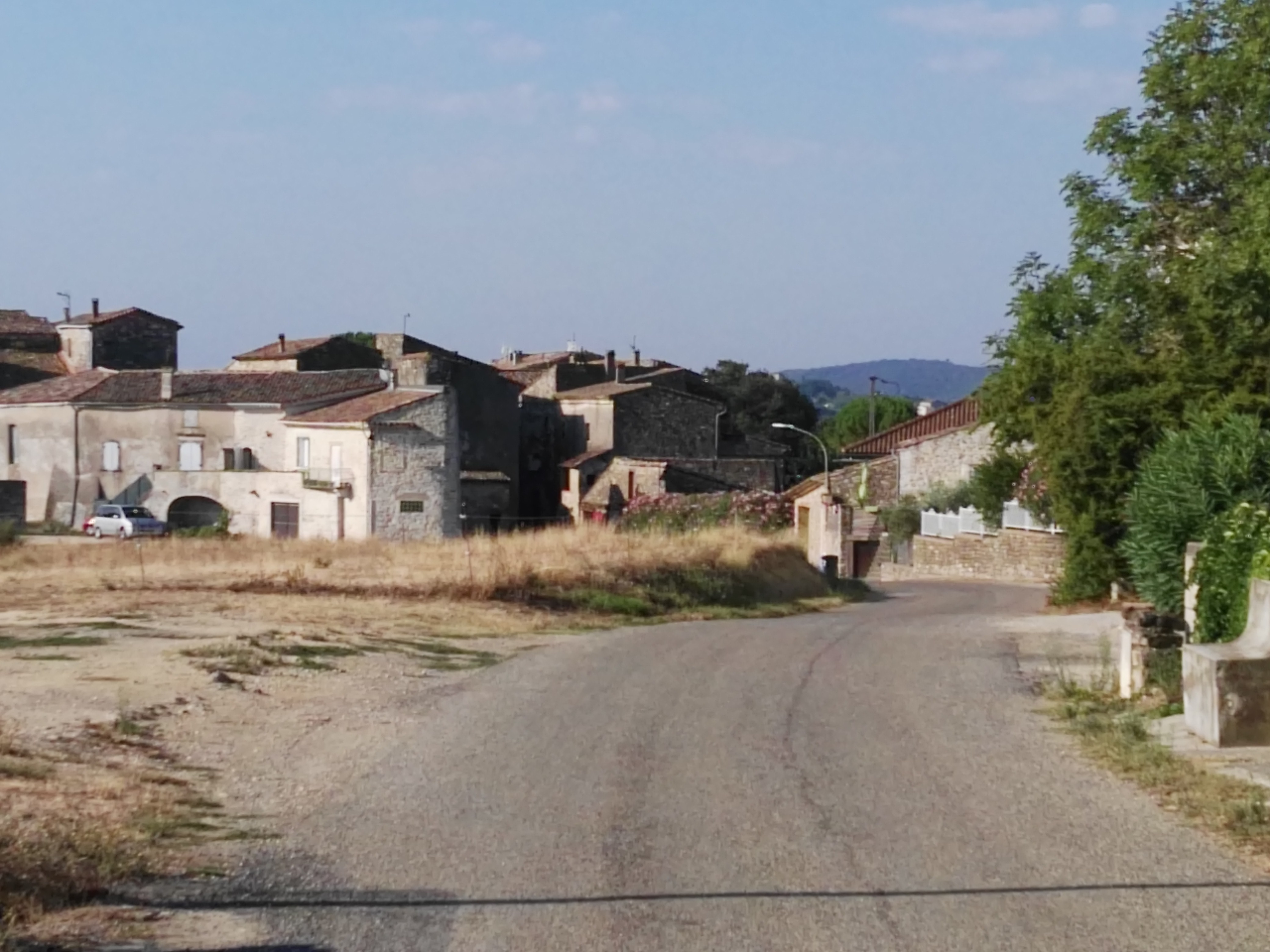 vue Est depuis les vignes